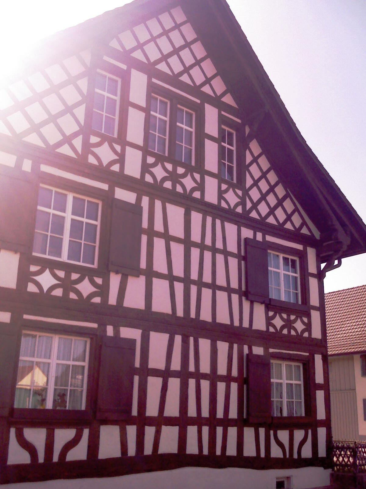 Faktrabdomo en Felben-Wellhausen, Kantono Turgovio, Svislando